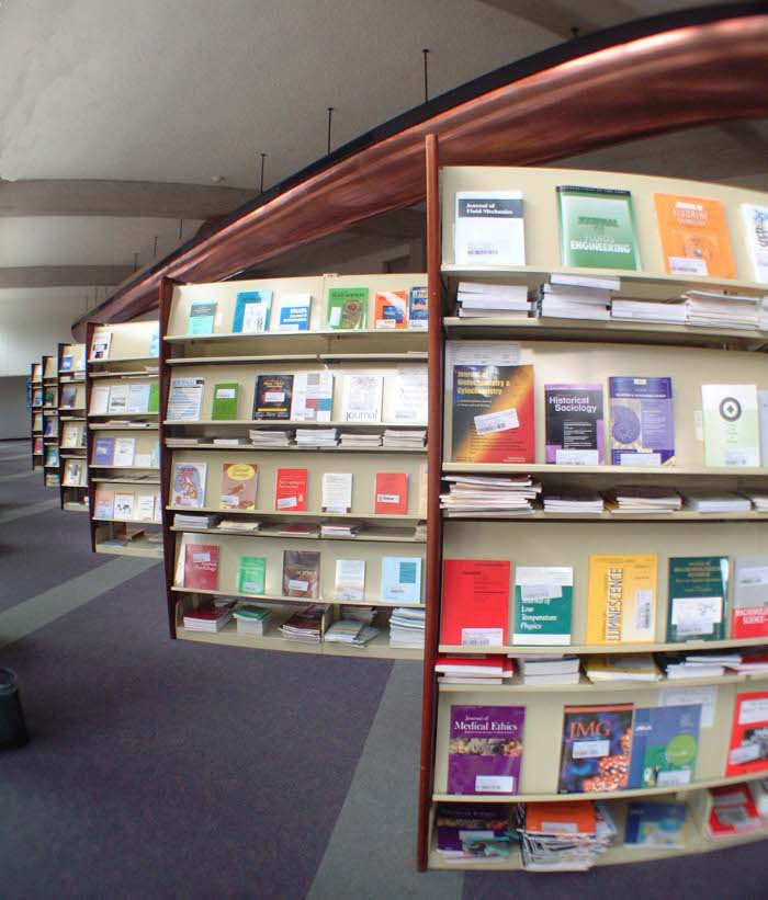 Interna